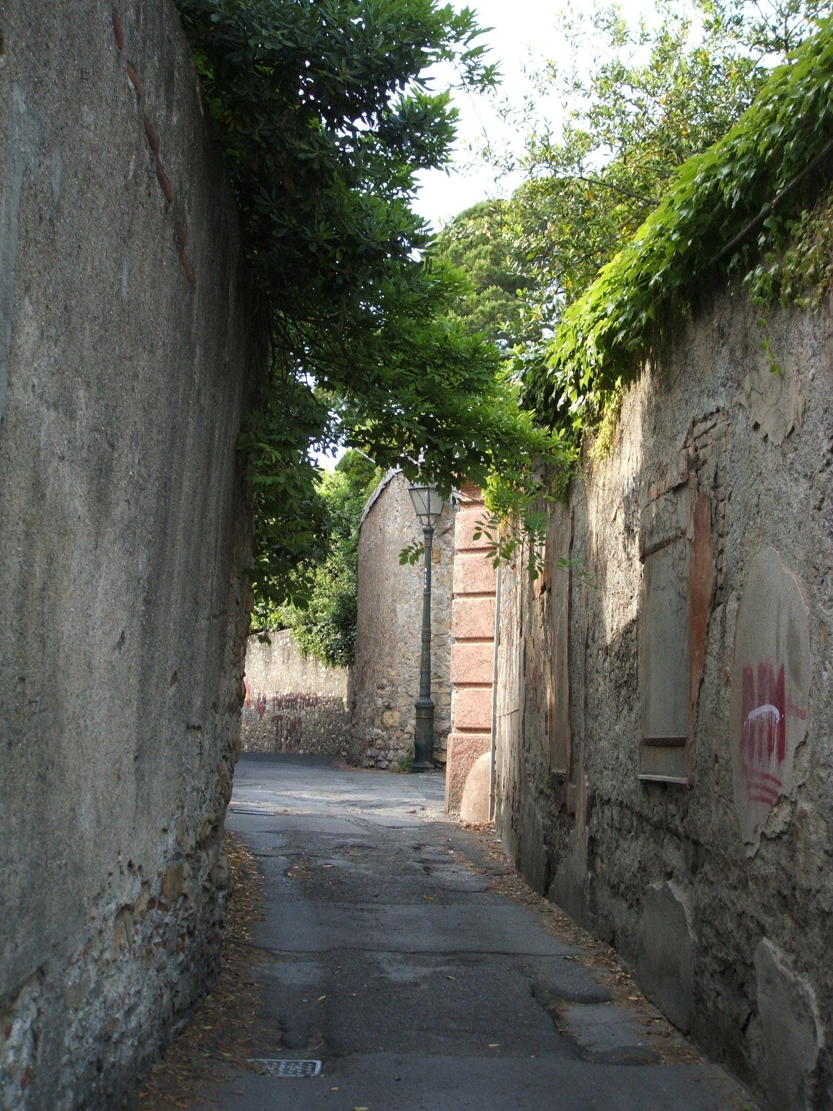 Genova, immagine dal quartiere di Albaro